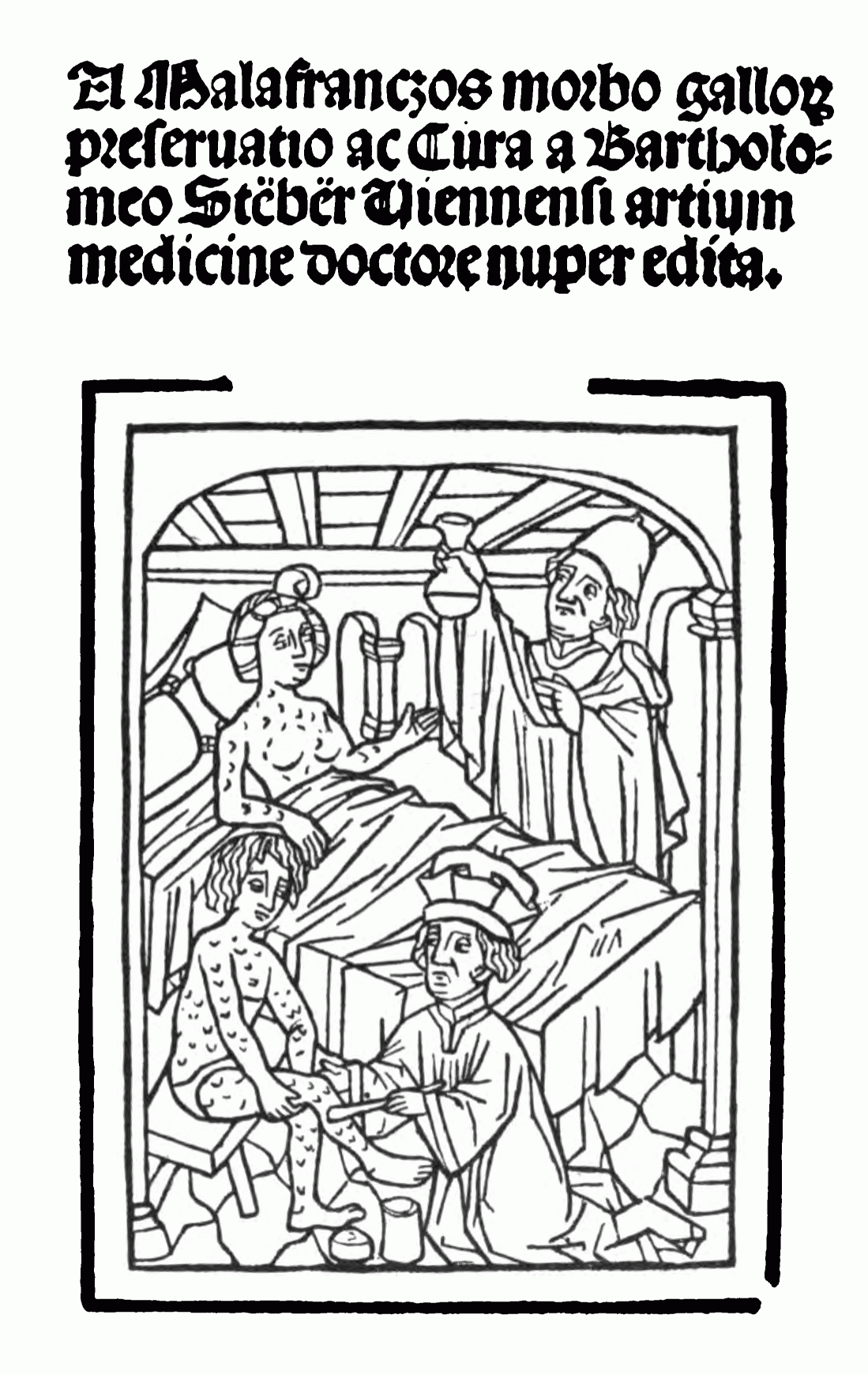 (Title page of) A Malafranczos morbo gallorum preservatio ac Cura a Bartolomeo Steber Viennensi artiu medicine doctore nuper edita